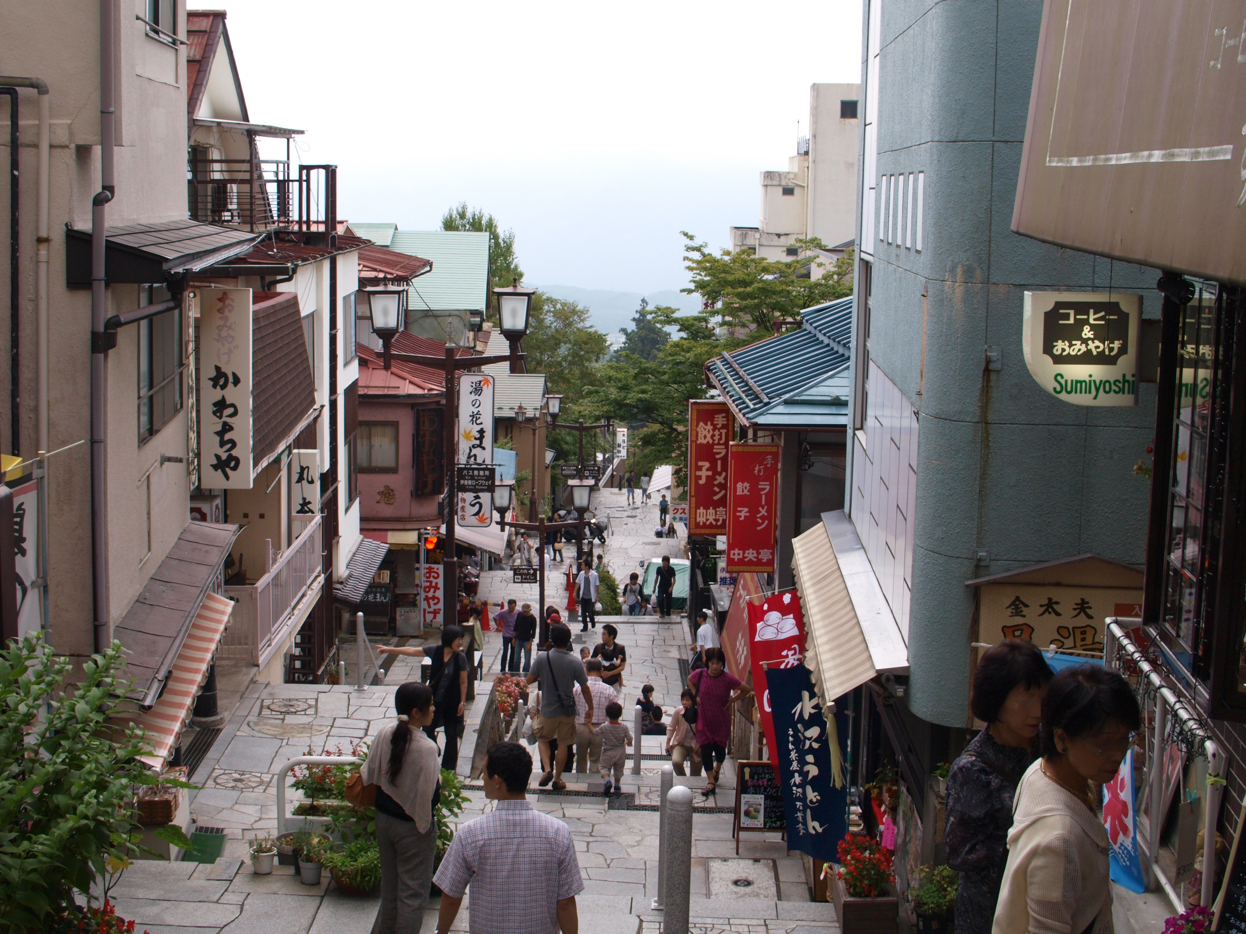 伊香保温泉・石段街。